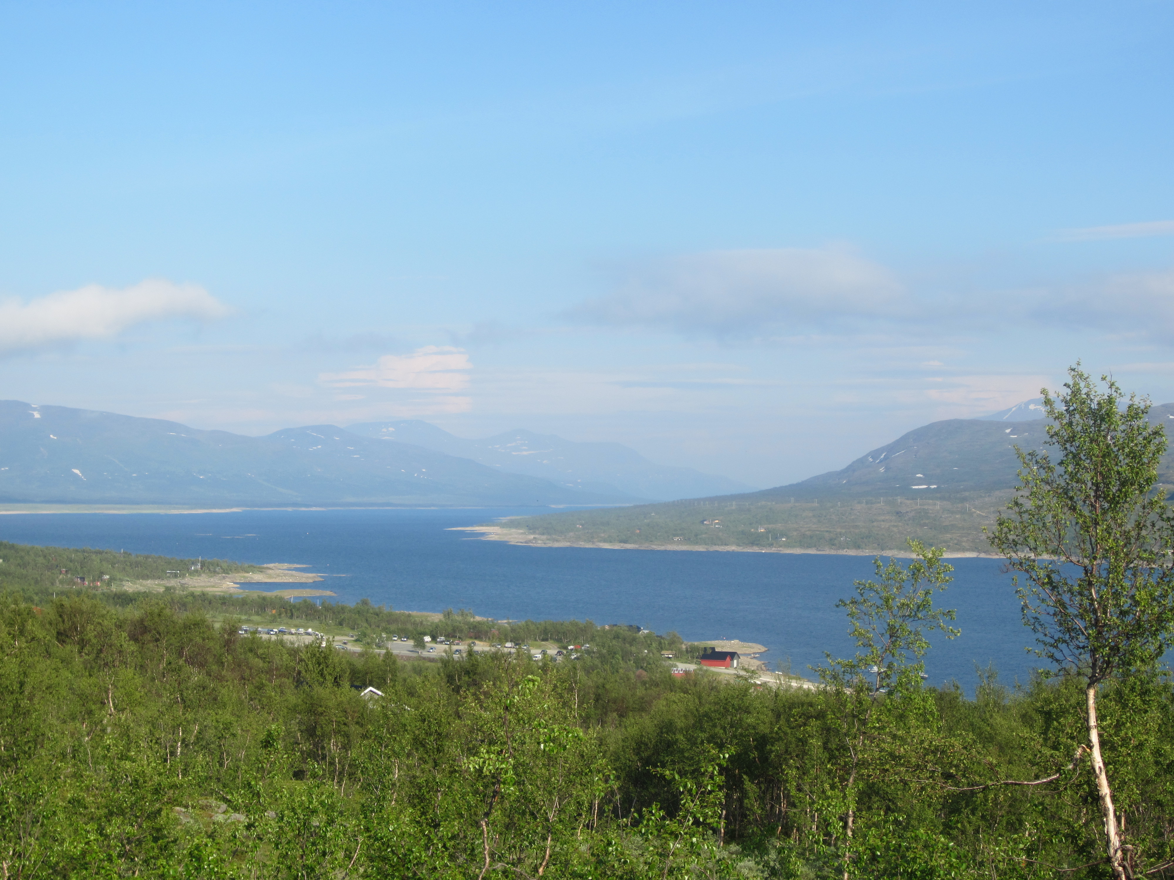 Altevatnet i Bardu kommune i Troms fylke.